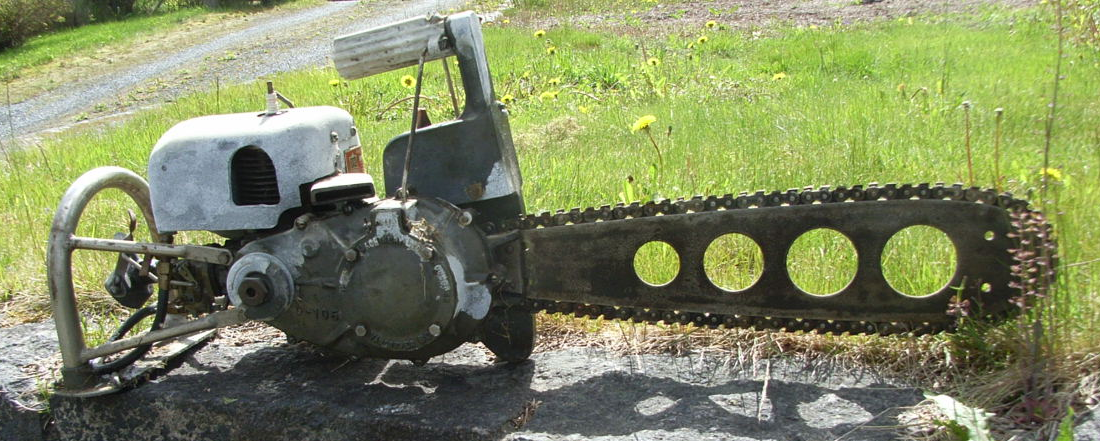 PM Universal